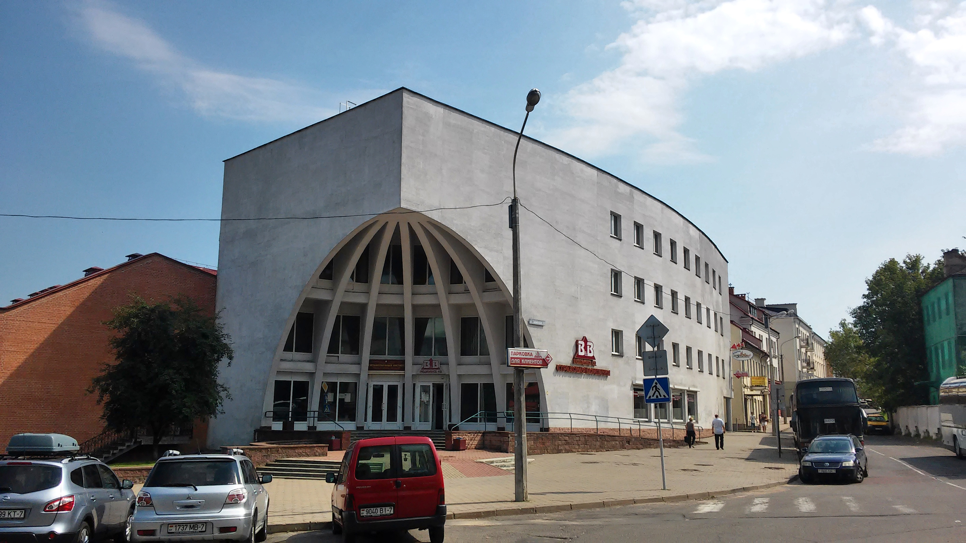 Мінск. Вуліца Замкавая, 33